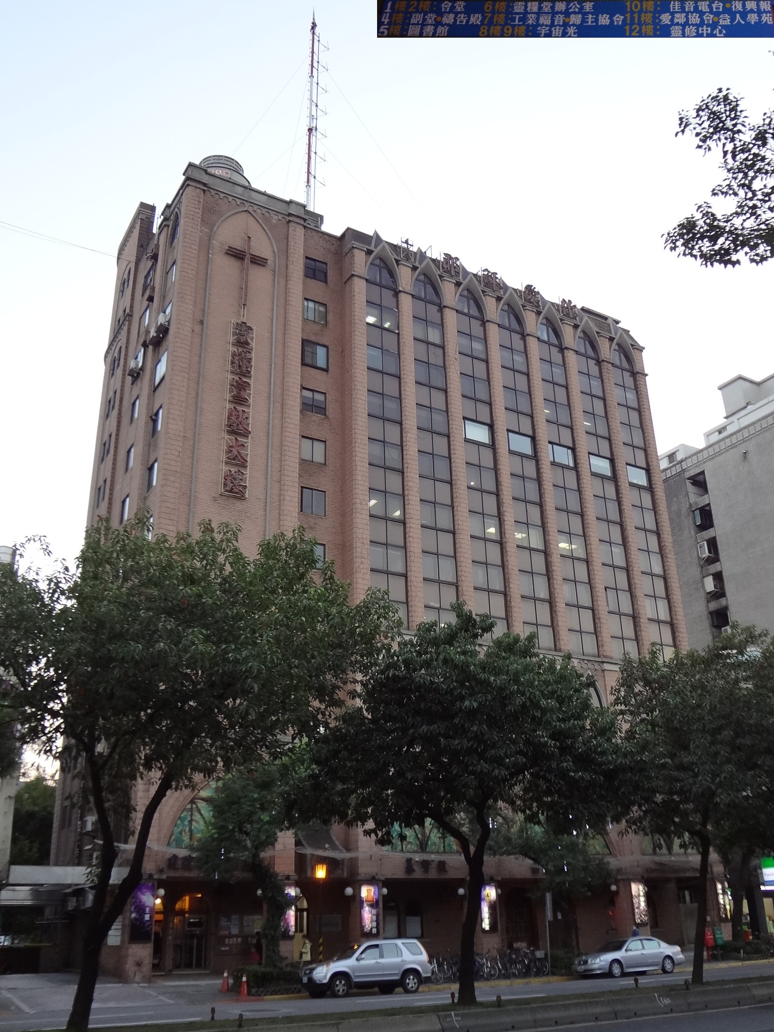 靈糧宣教大樓，位於臺北市大安區和平東路二段24號，5樓是圖書館，6樓是臺北靈糧堂辦公室，10樓是佳音廣播電臺與《國度復興報》總部。